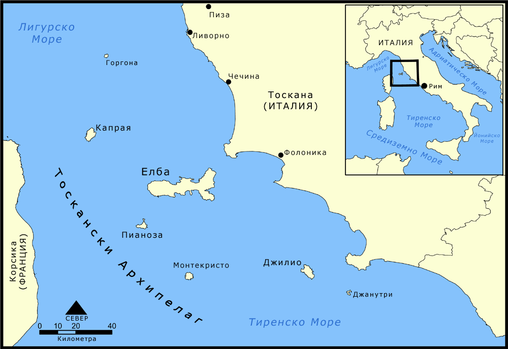 Островите на Тосканския архипелаг